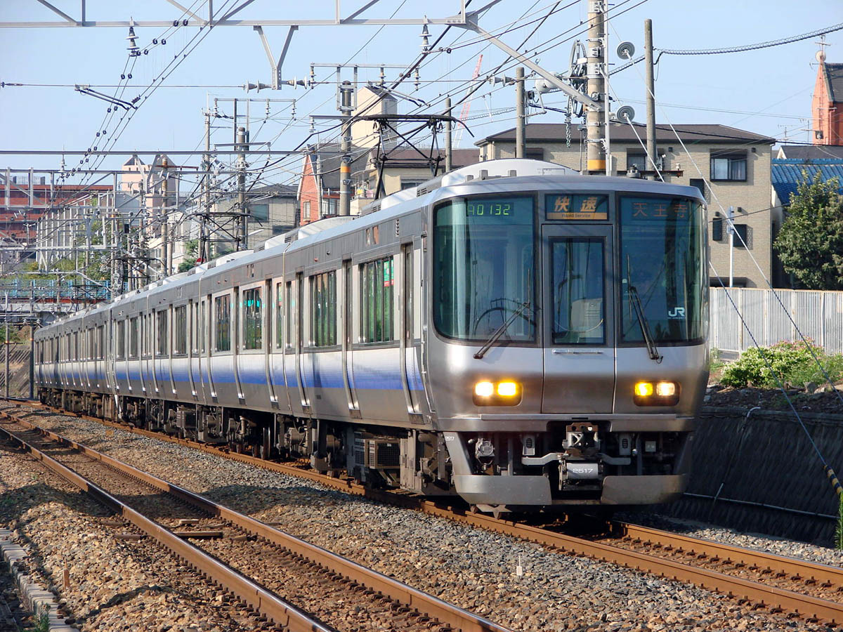 JR西日本 223系